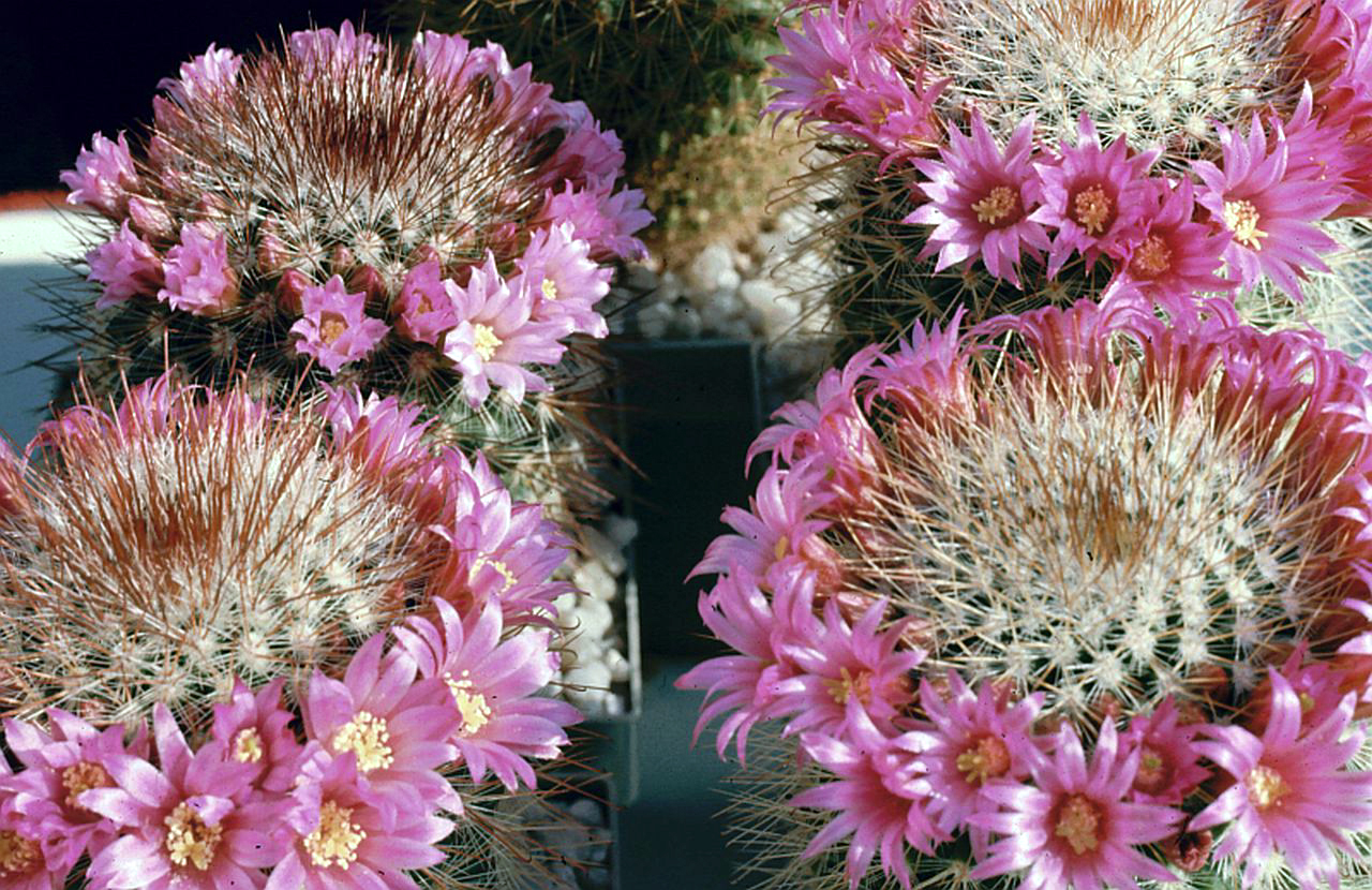 Mammillaria crinita